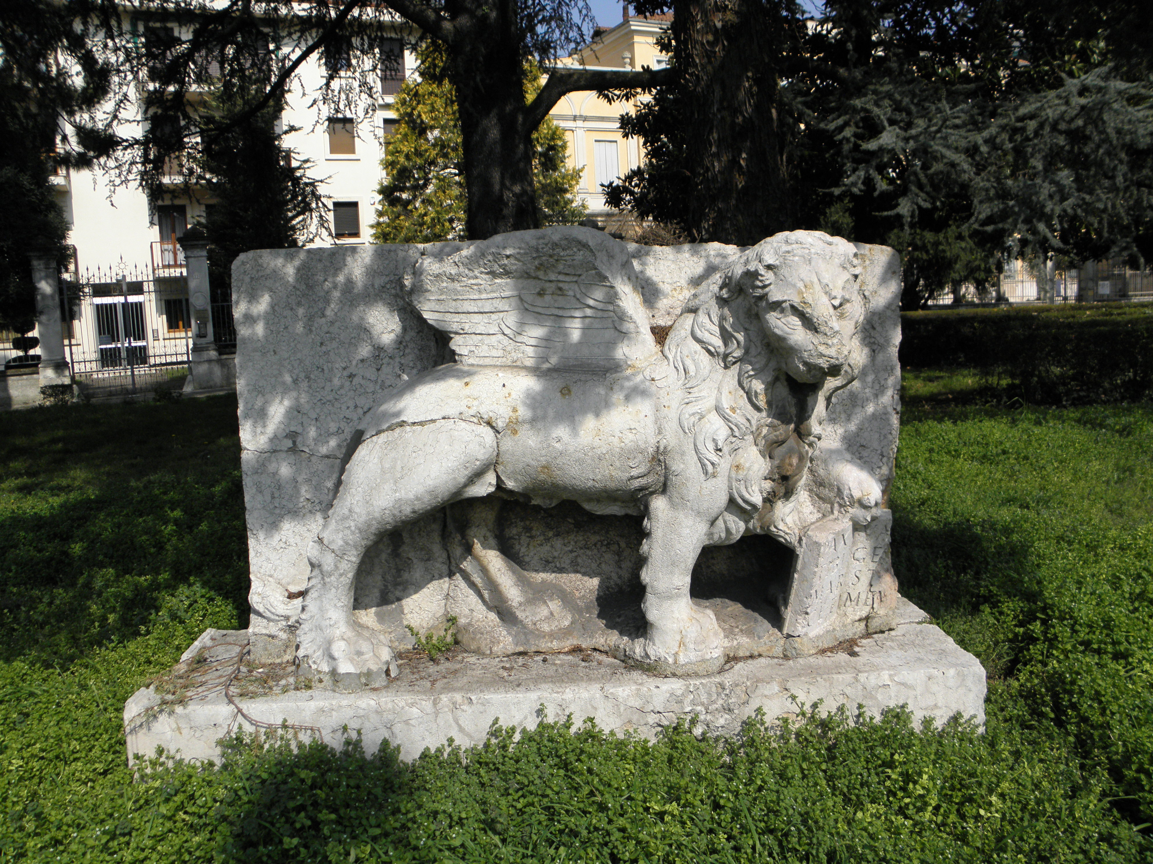 Legnago, via XX settembre: la statua del leone marciano simbolo della Repubblica di Venezia.